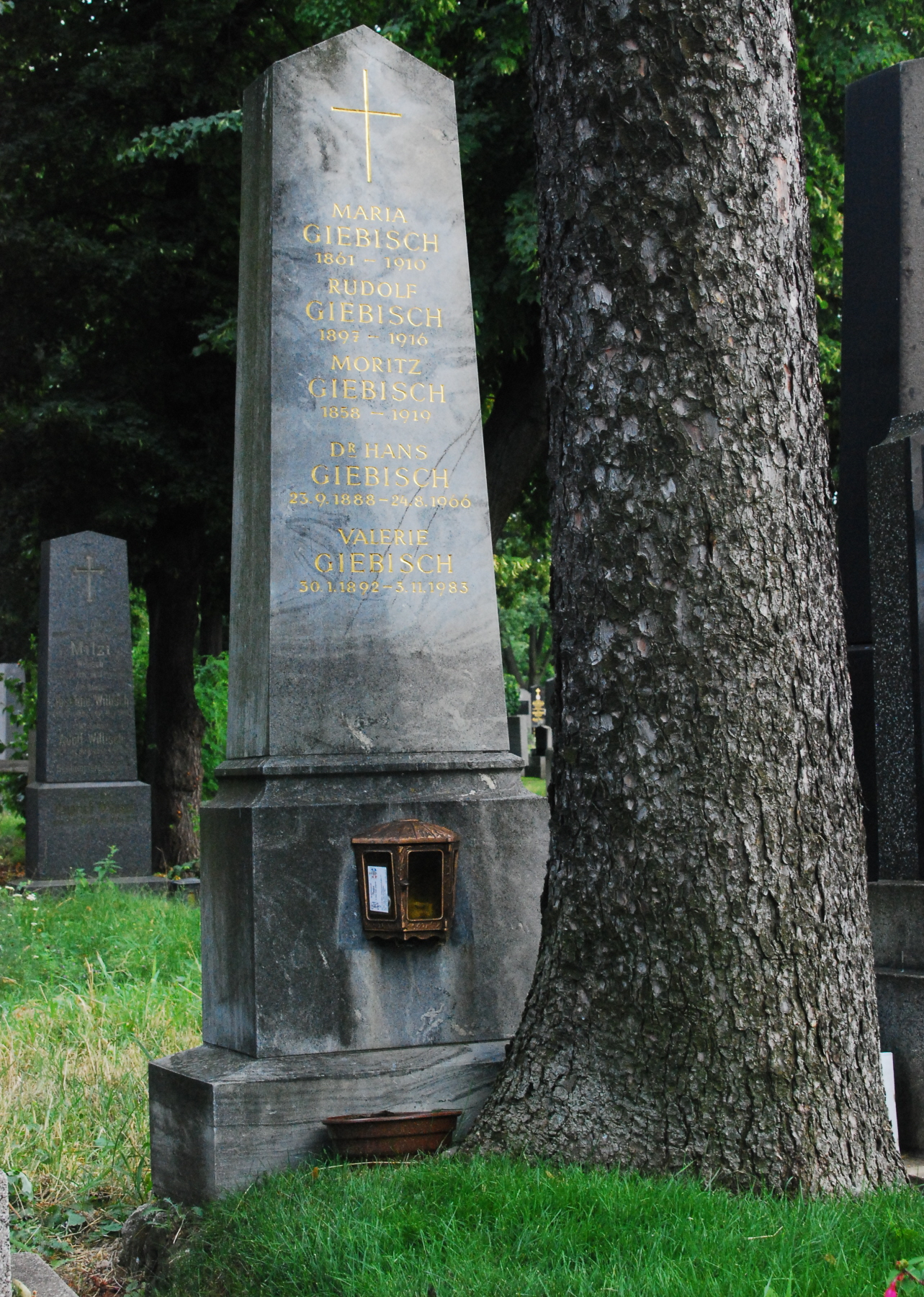 Grabsteineinschrift: „Maria Giebisch, 1861 – 1910 Rudolf Giebisch, 1897 – 1916 Moritz Giebisch, 1858 – 1919 Dr. Hans Giebisch, 23. 9. 1888 – 24. 8. 1966 Valerie Giebisch, 30. 1. 1892 – 3. 11. 1983“